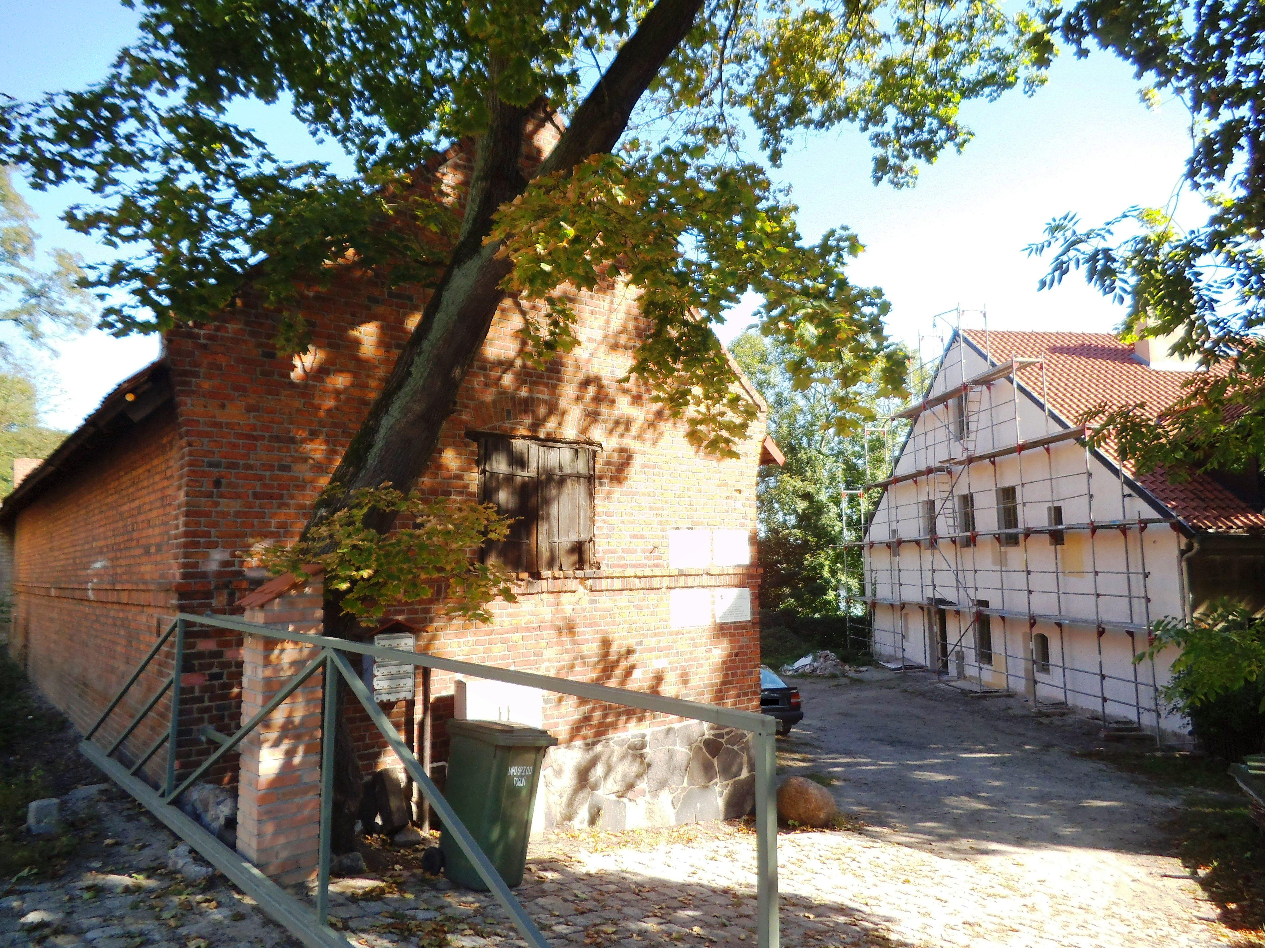 Budynek przy ul. Winnica 44 w Toruniu3